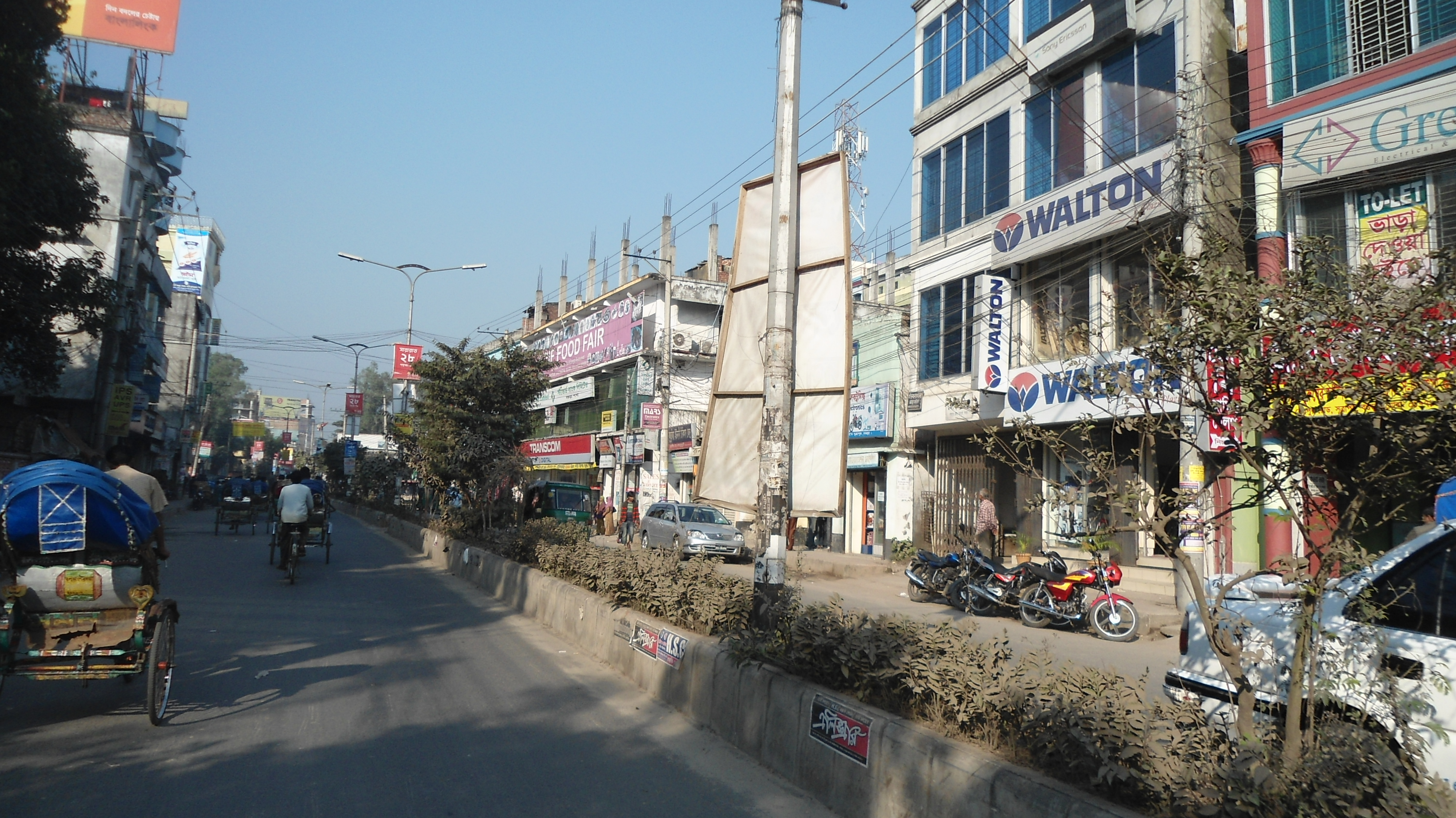 Bogra